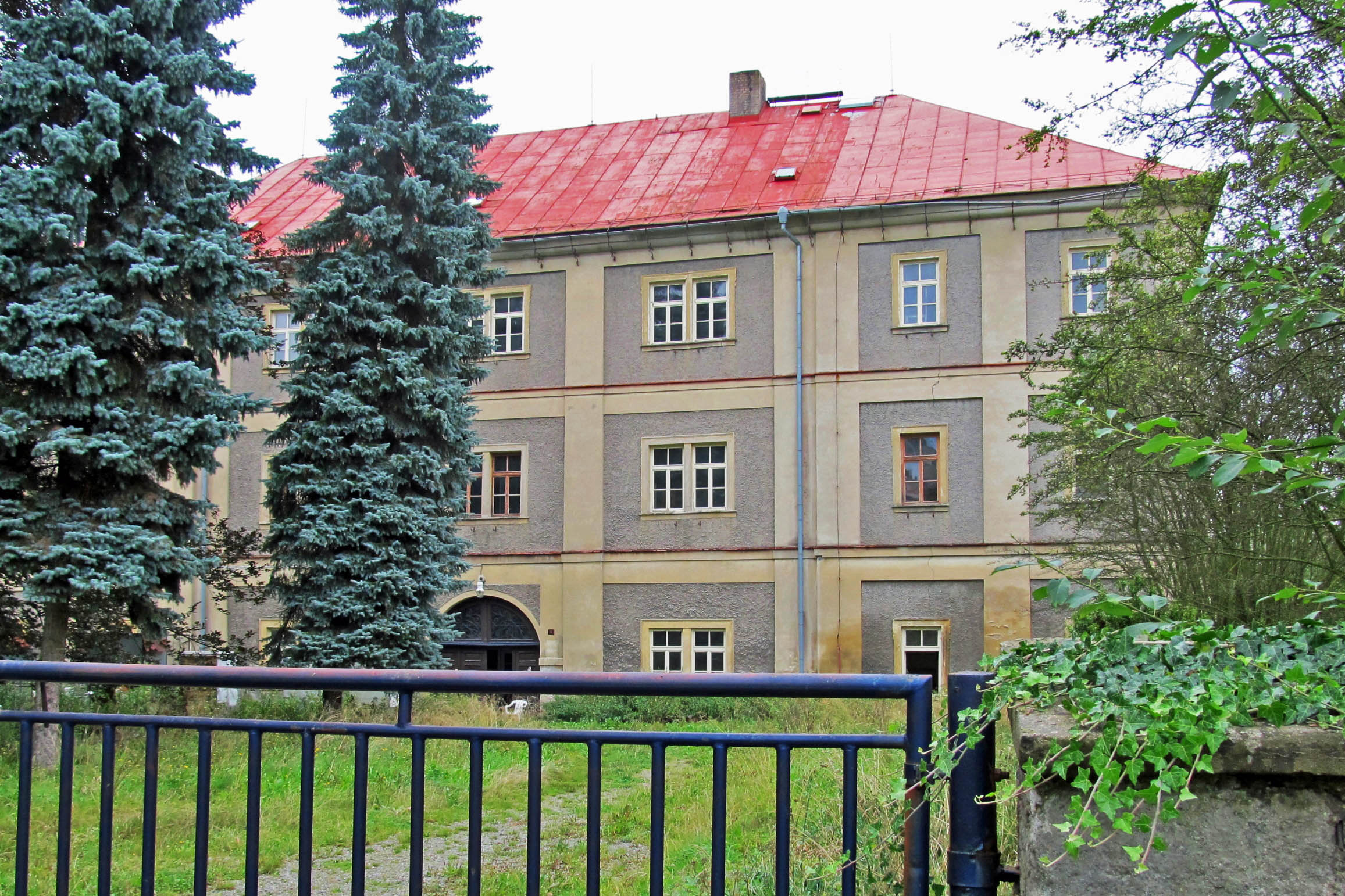 Zámek Stárkov, Stárkov 1